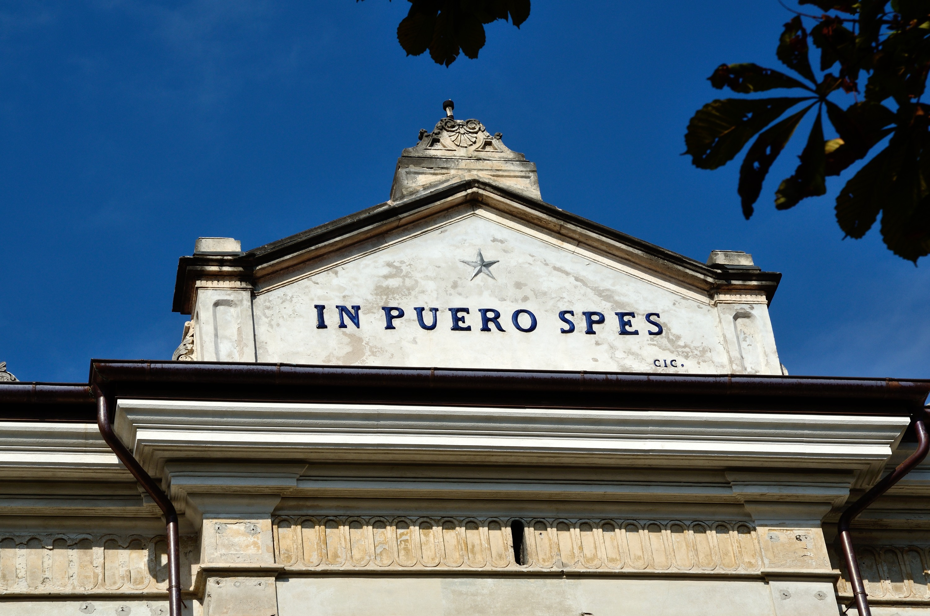 ex Asilo Rossi This is a photo of a monument which is part of cultural heritage of Italy.